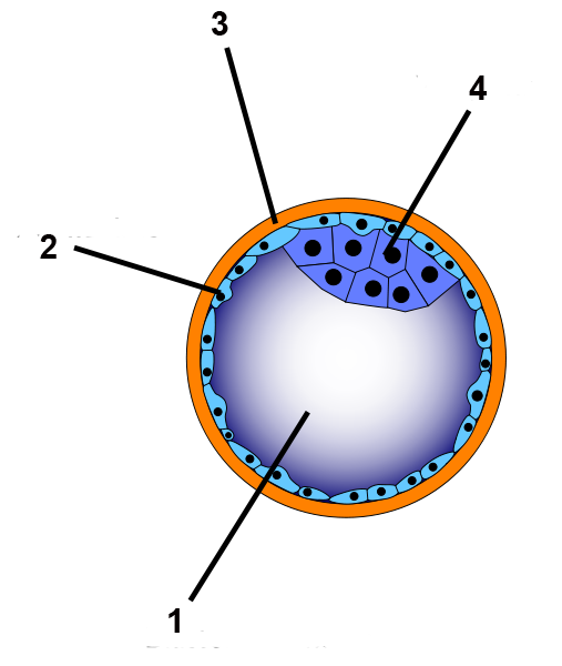 Blastocyste (d'après GFDL allemand; présentation neutre